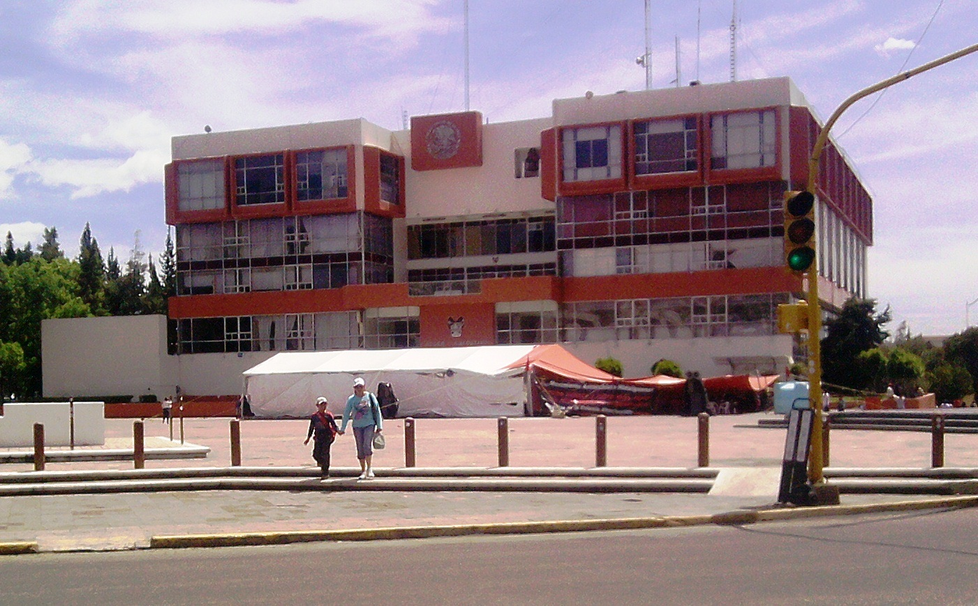 Palacio de Gobierno del Estado de Hidalgo, en Pahuca, México